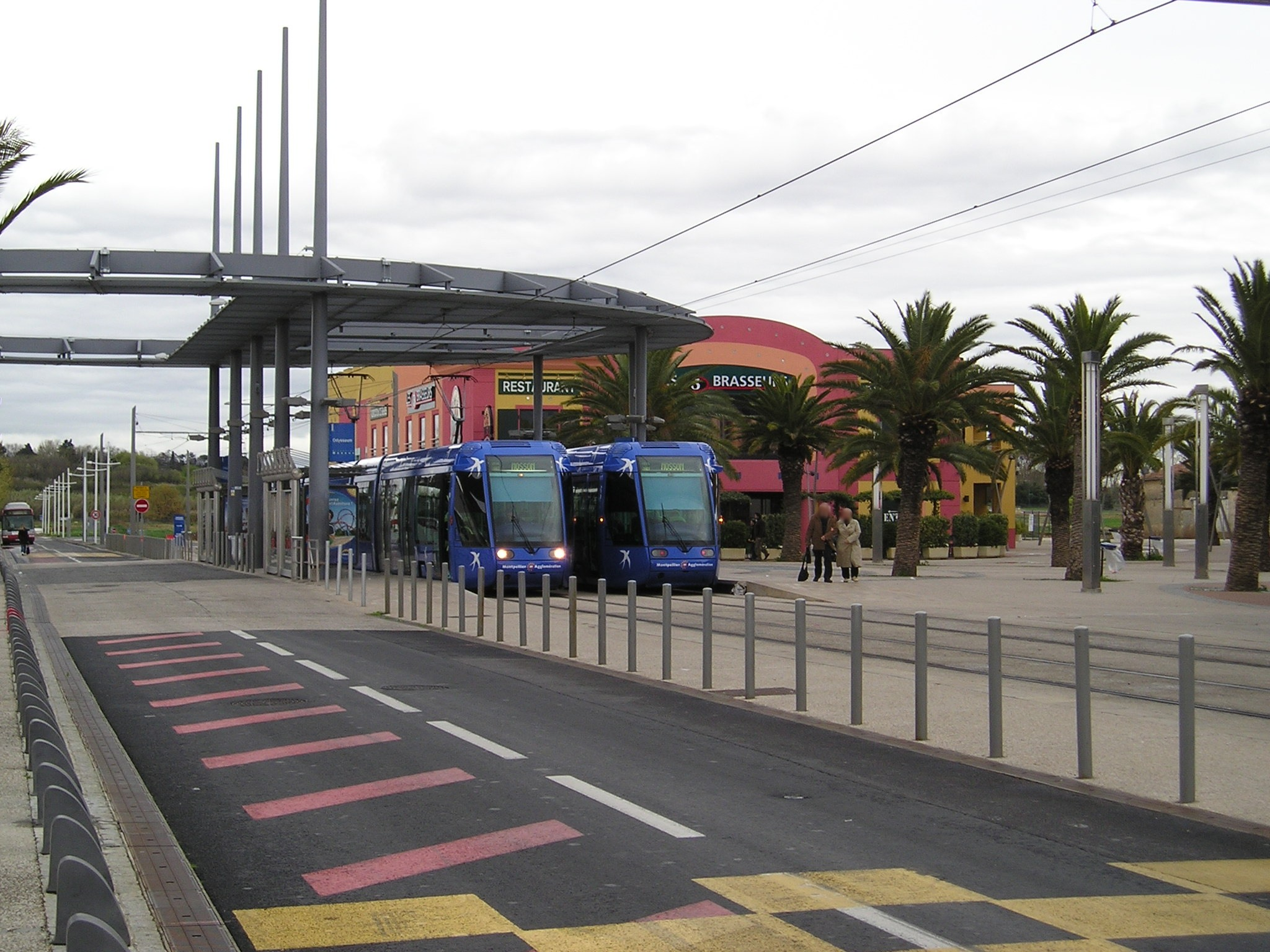 Deux rames de la ligne 1 du tramway de Montpellier à l'arrêt à la station Odysseum. Sur la droite, l'allée Ulysse (voir Image:Montpellier Odysseum Allee Ulysse 10042006.JPG).